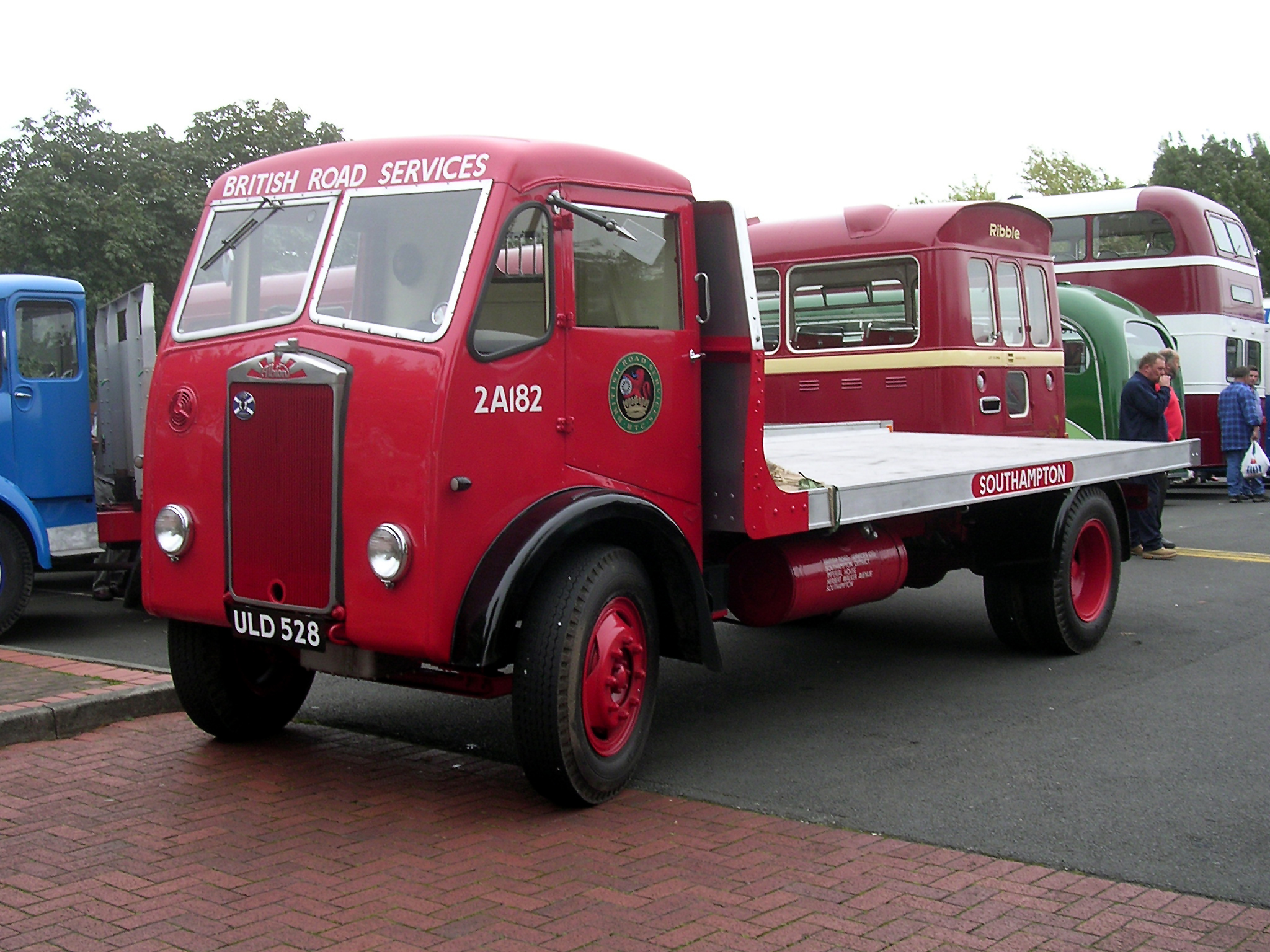 Albion